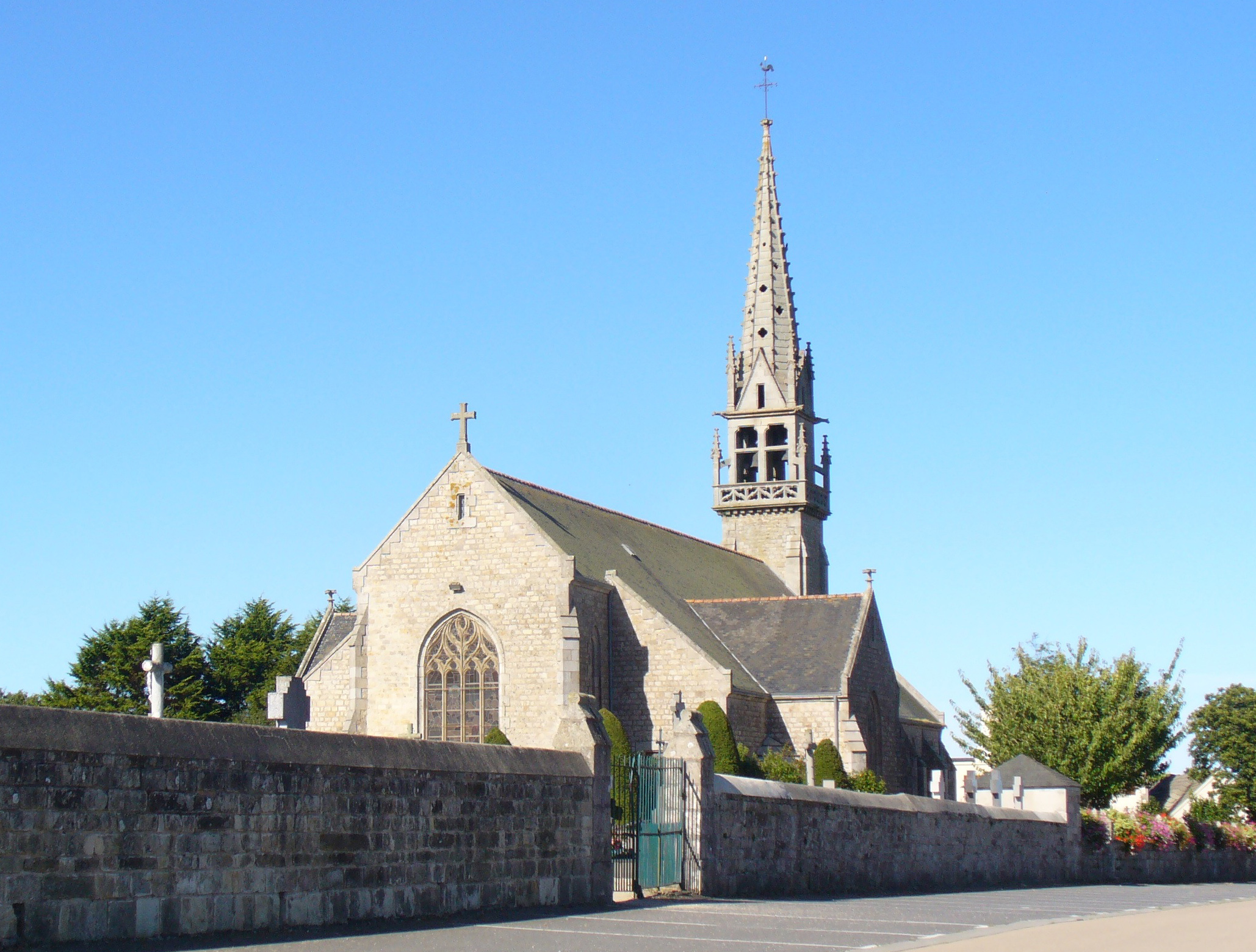 Eglise de Mespaul